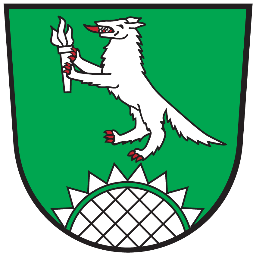 Wappen von Mölbling